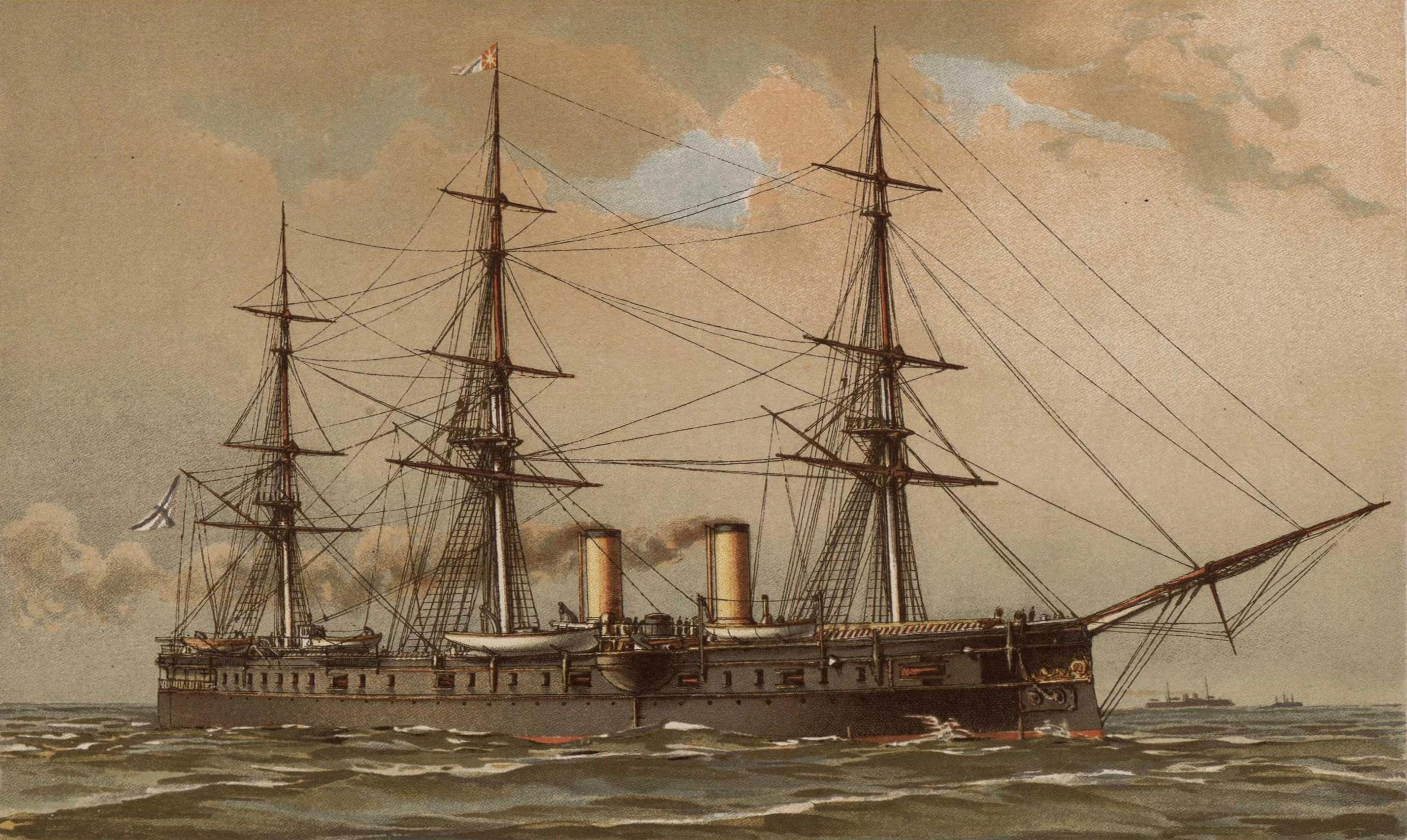 Dmitrii Donskoi (armored cruiser)